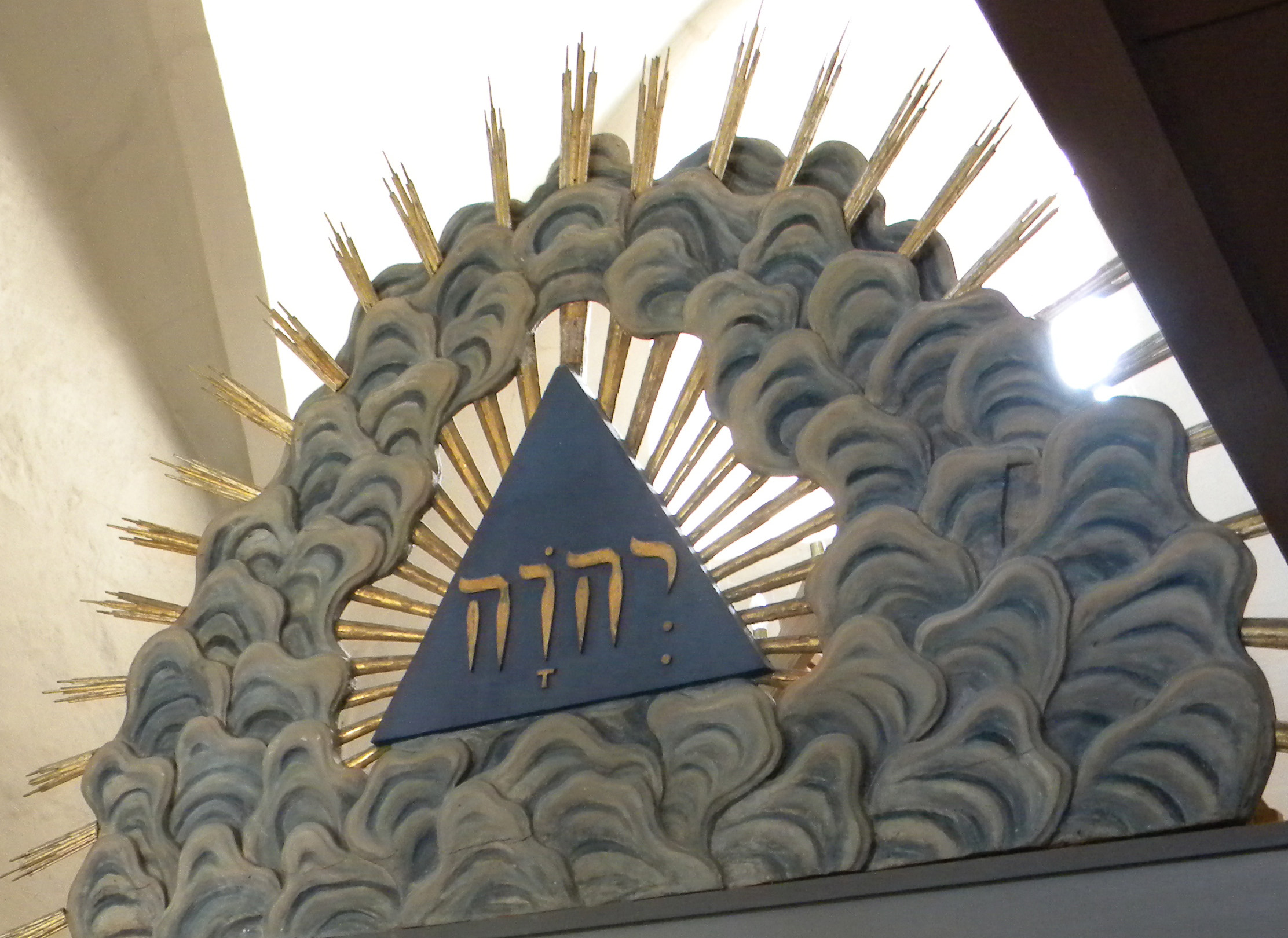 Hästveda kyrka - Altarkrönet med tetragrammet JHWH som flyttats och nu finns över ingången till sakristian